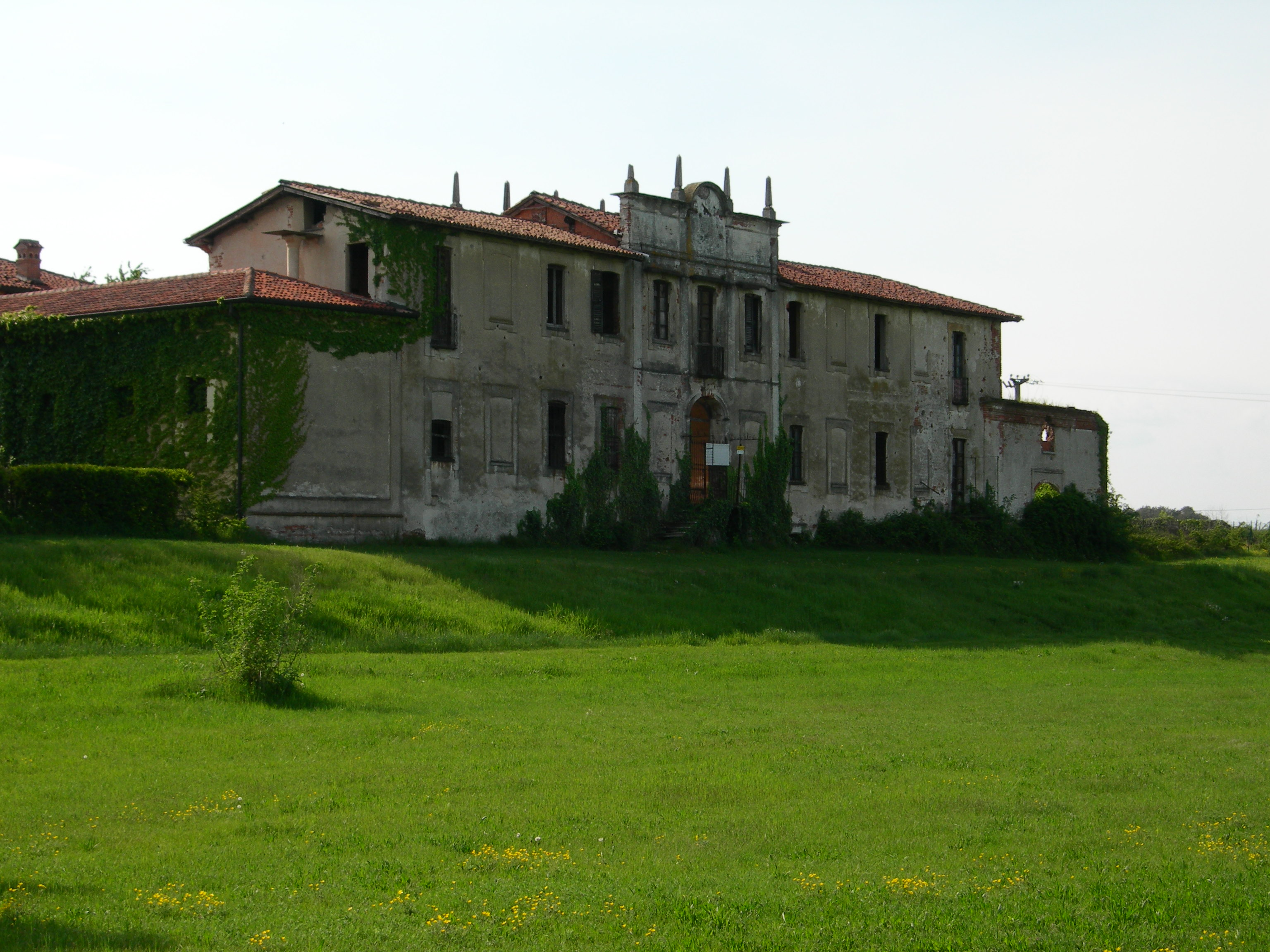 Cascina galdina, Cameri (NO). Scattata con Nikon Coolpix